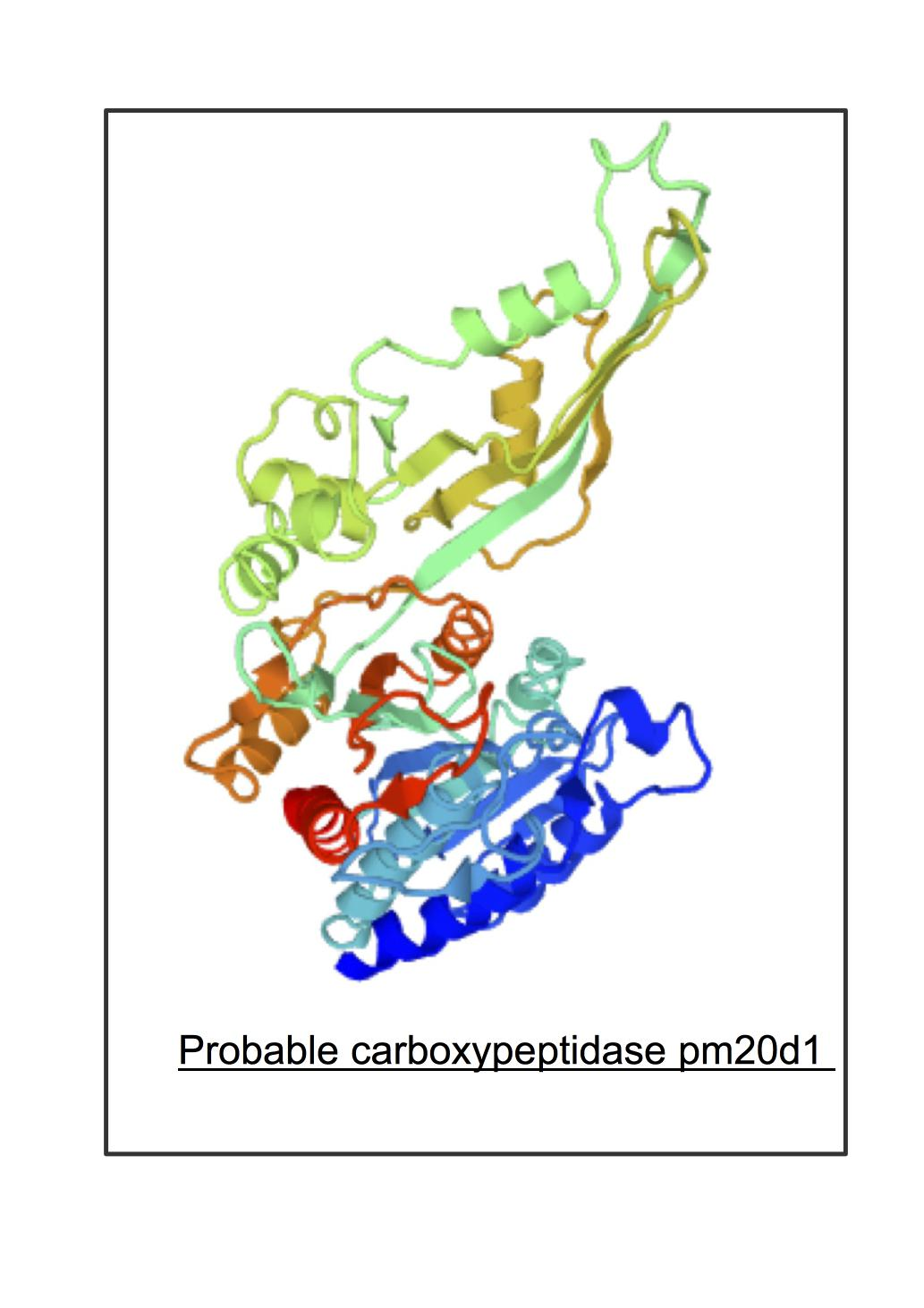 Proteína probable carboxypeptidase pm20d1